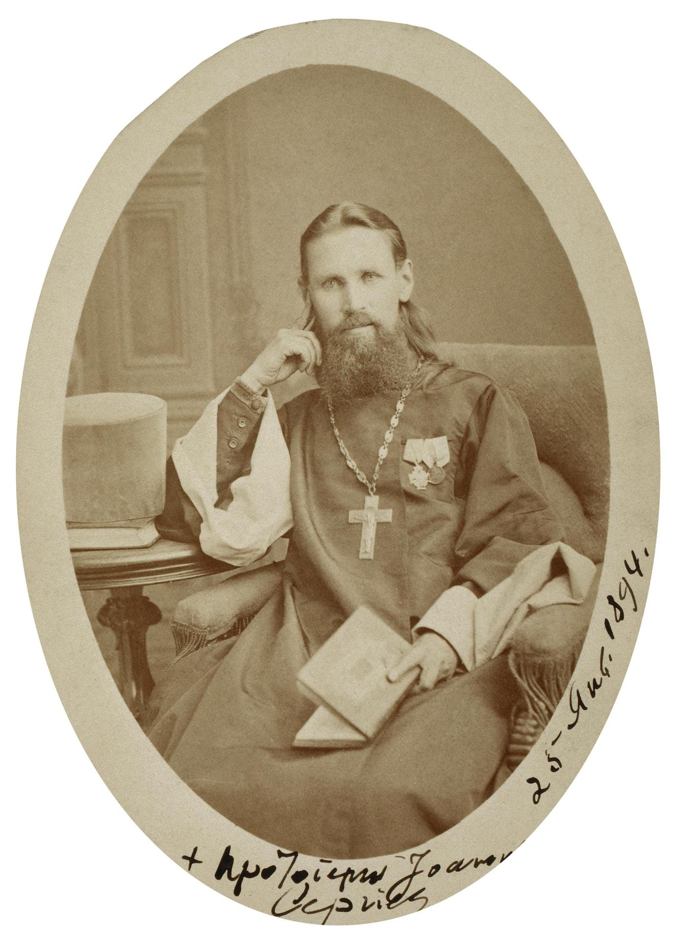 Иоанн Кронштадтский